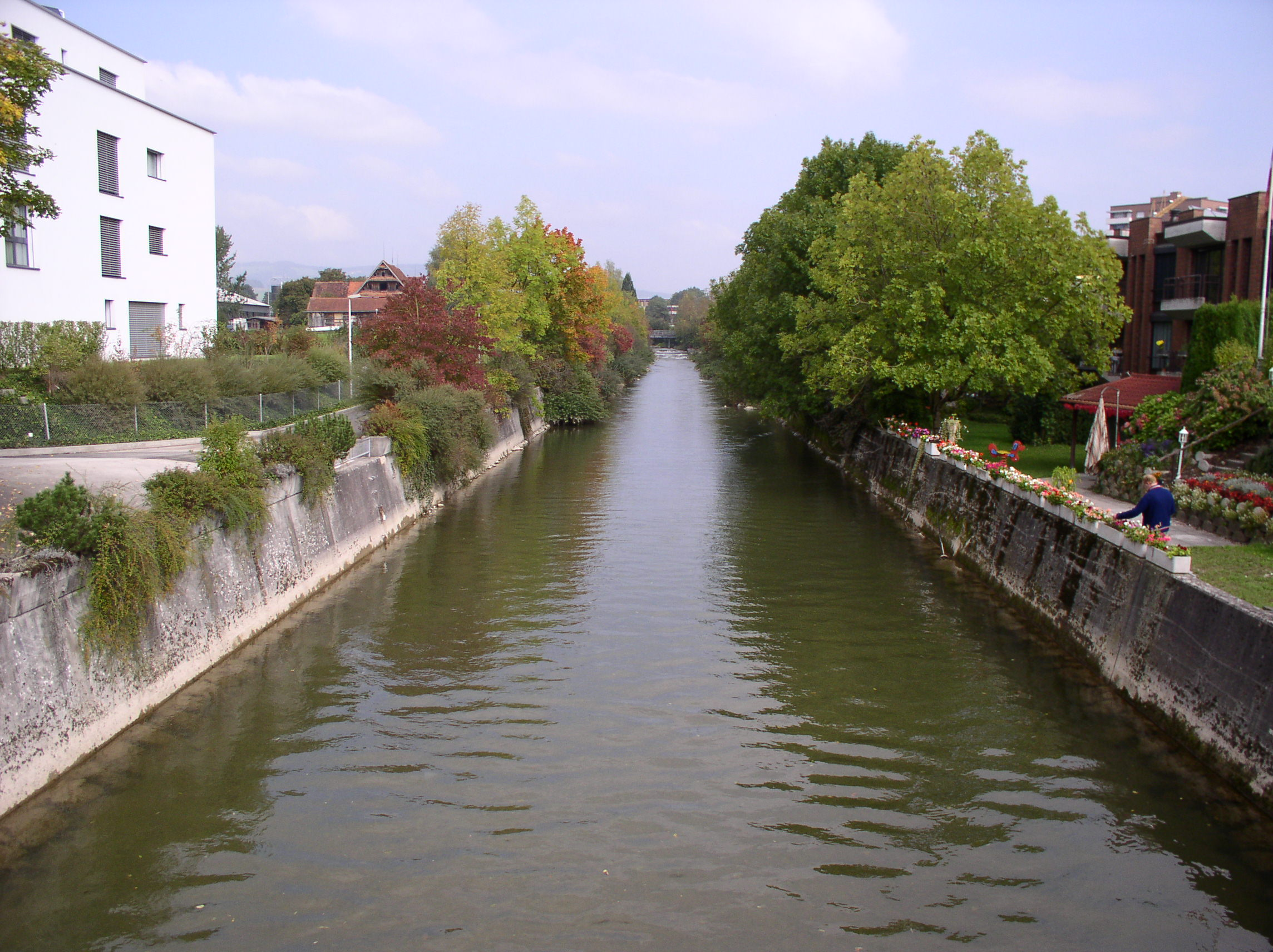 Description: Kanalisierte Lorze in Zug kurz vor der Mündung in den Zugersee Source: photo taken by me, October 2005 Photographer: Baikonur